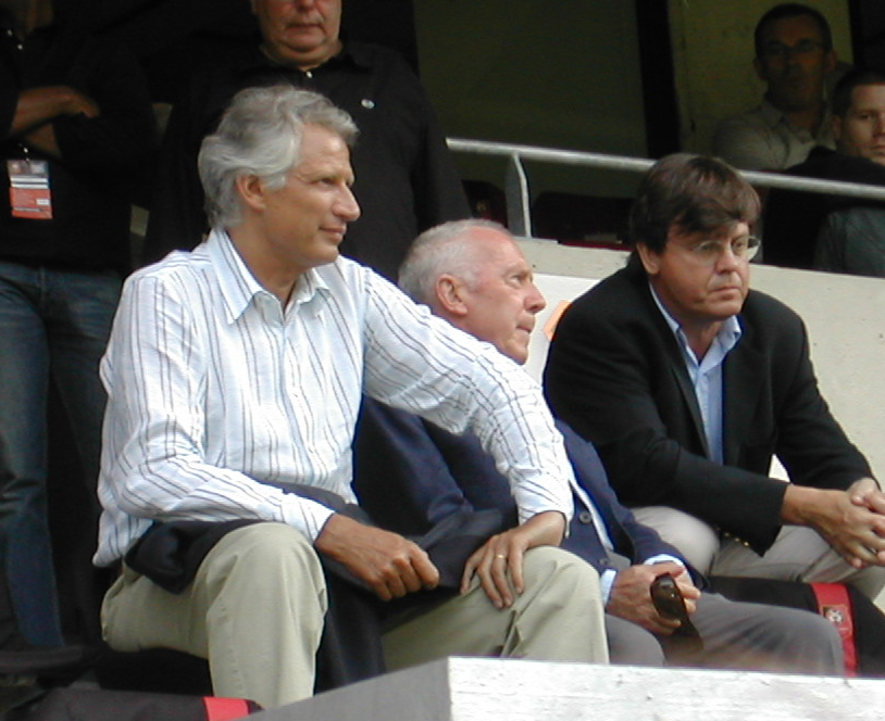 Dominique de Villepin, François Pinault, alors propriétaire du Stade rennais et Emmanuel Cueff, alors président du club au Stade de la Route de Lorient, lors du match d'ouverture de la saison 2006-2007